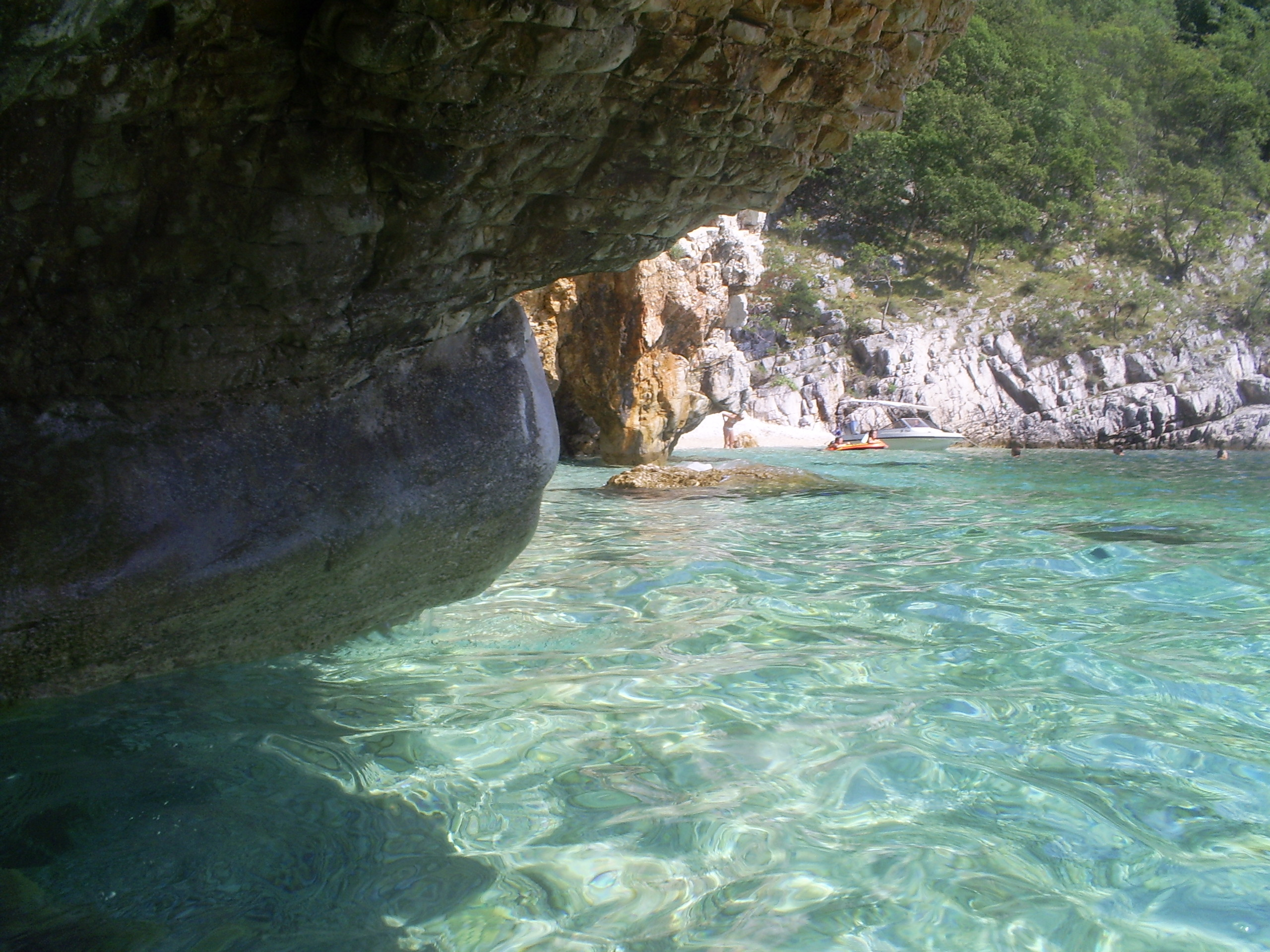 Cres blizu Porozine